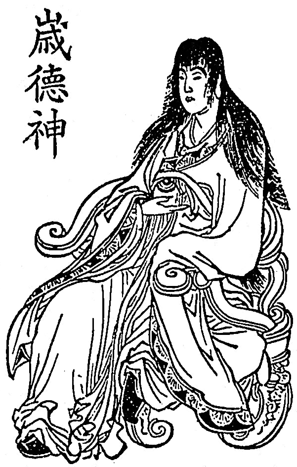 God of Toshitoku. 歳徳神